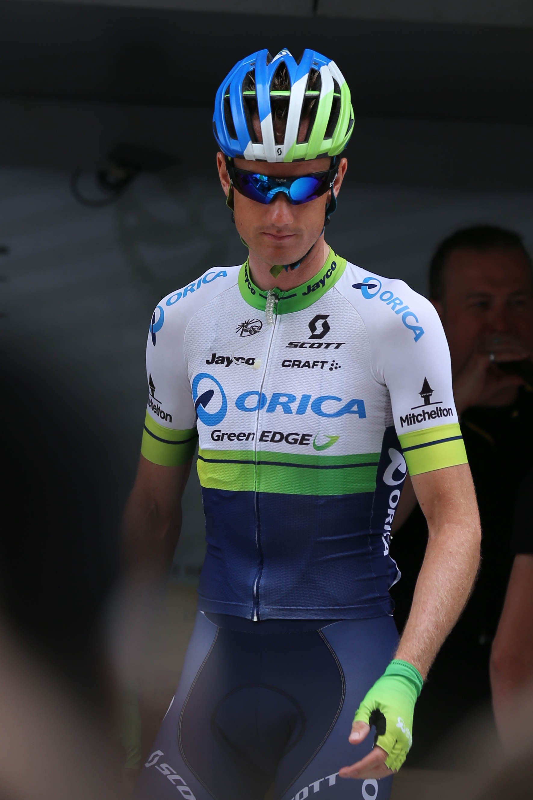 Pieter Weening lors du départ de la 8e étape du Tour de France 2015 à Rennes.